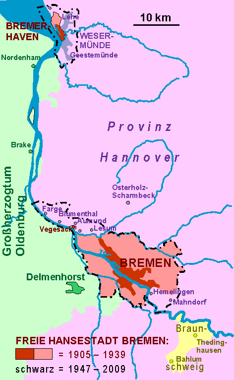 Karte der Hansestadt Bremen 1930. mit heutigen Grenzlinien